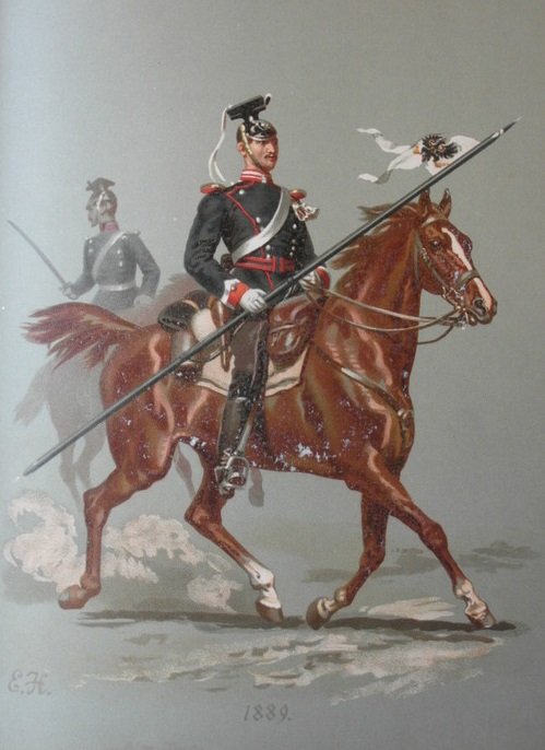 1889 lanciers du régiment de Düsseldorf